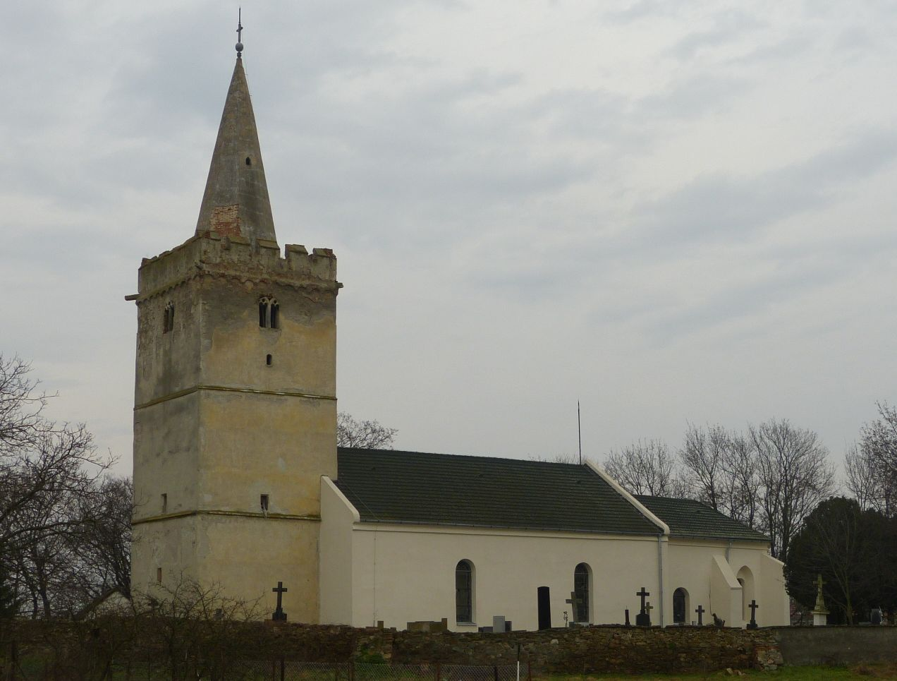 Kostel svatého Jiljí, Našiměřice.